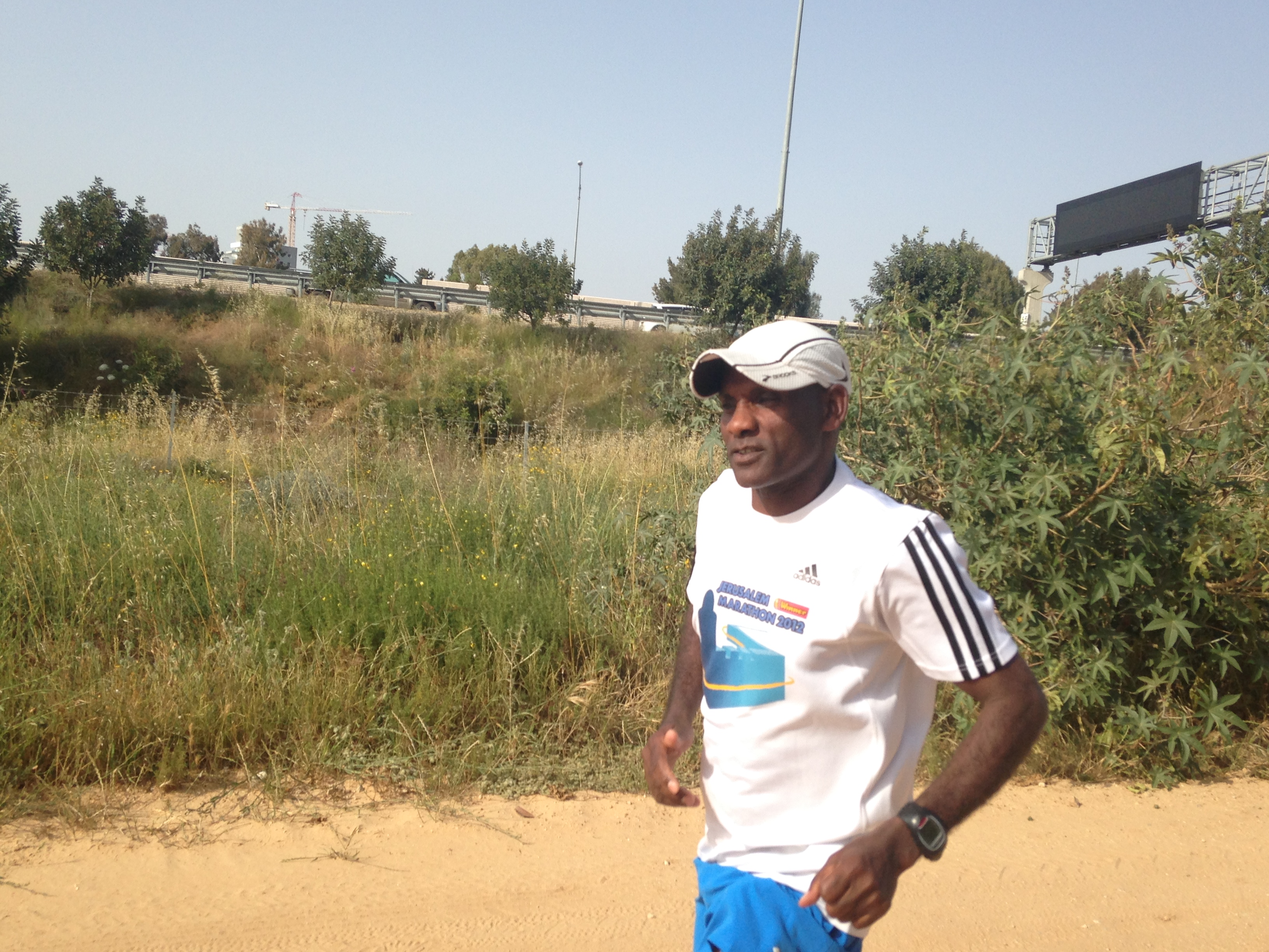 וודג' זבדיה באימון.